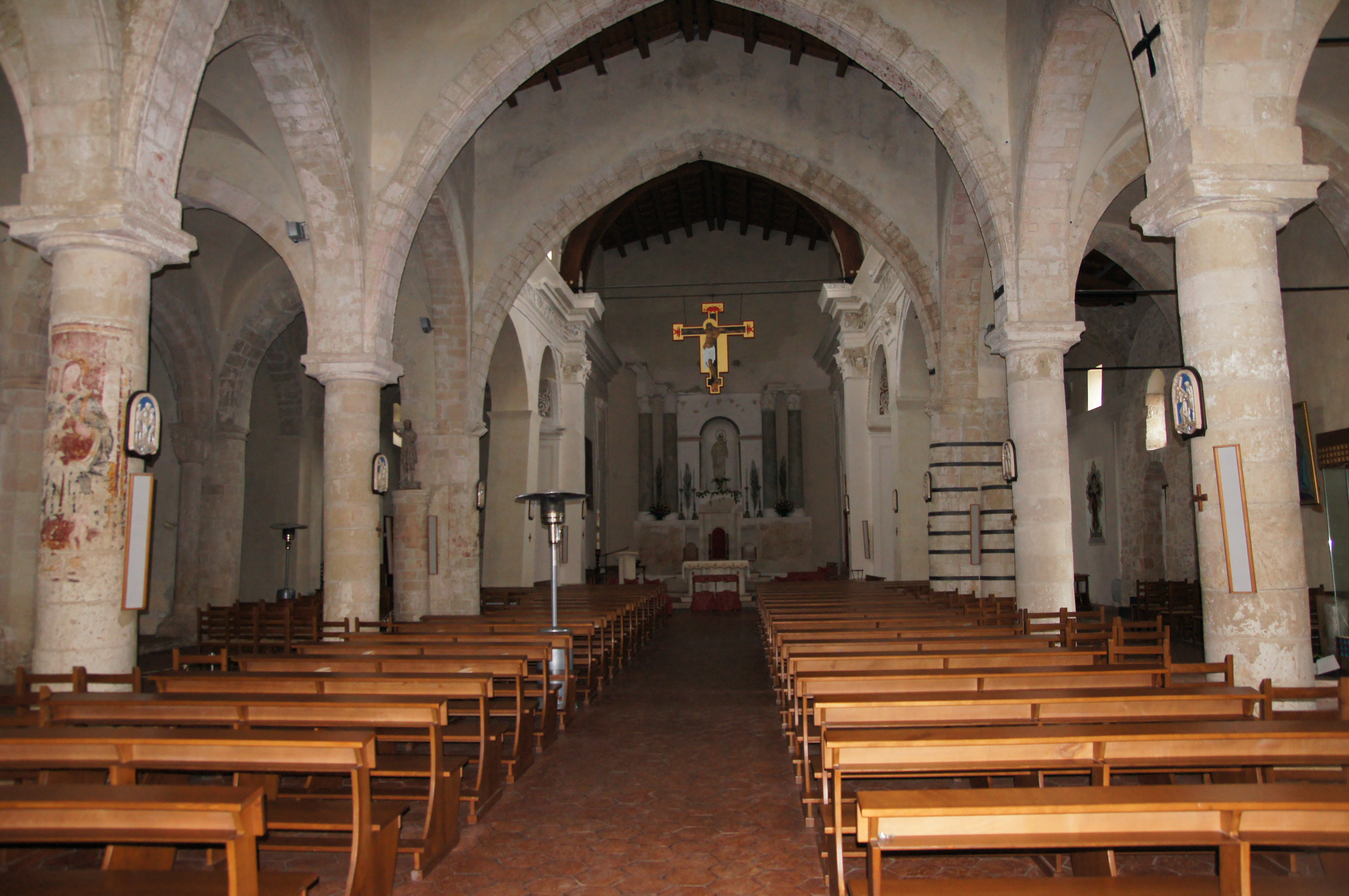 Caltabellotta